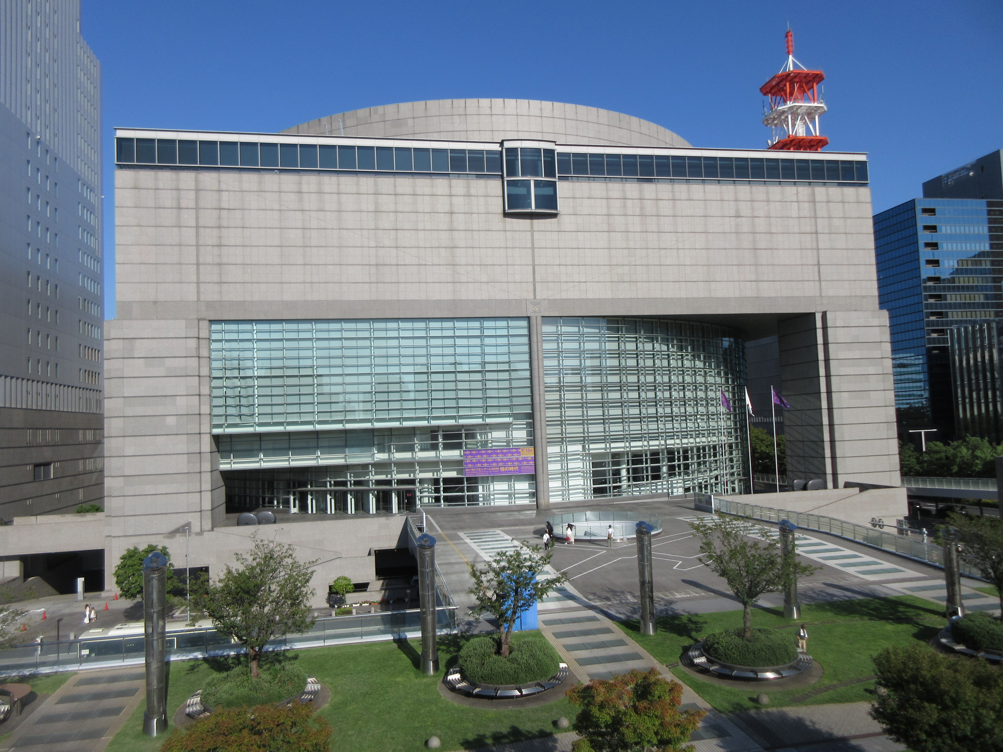 愛知芸術文化センター（名古屋市東区東桜）